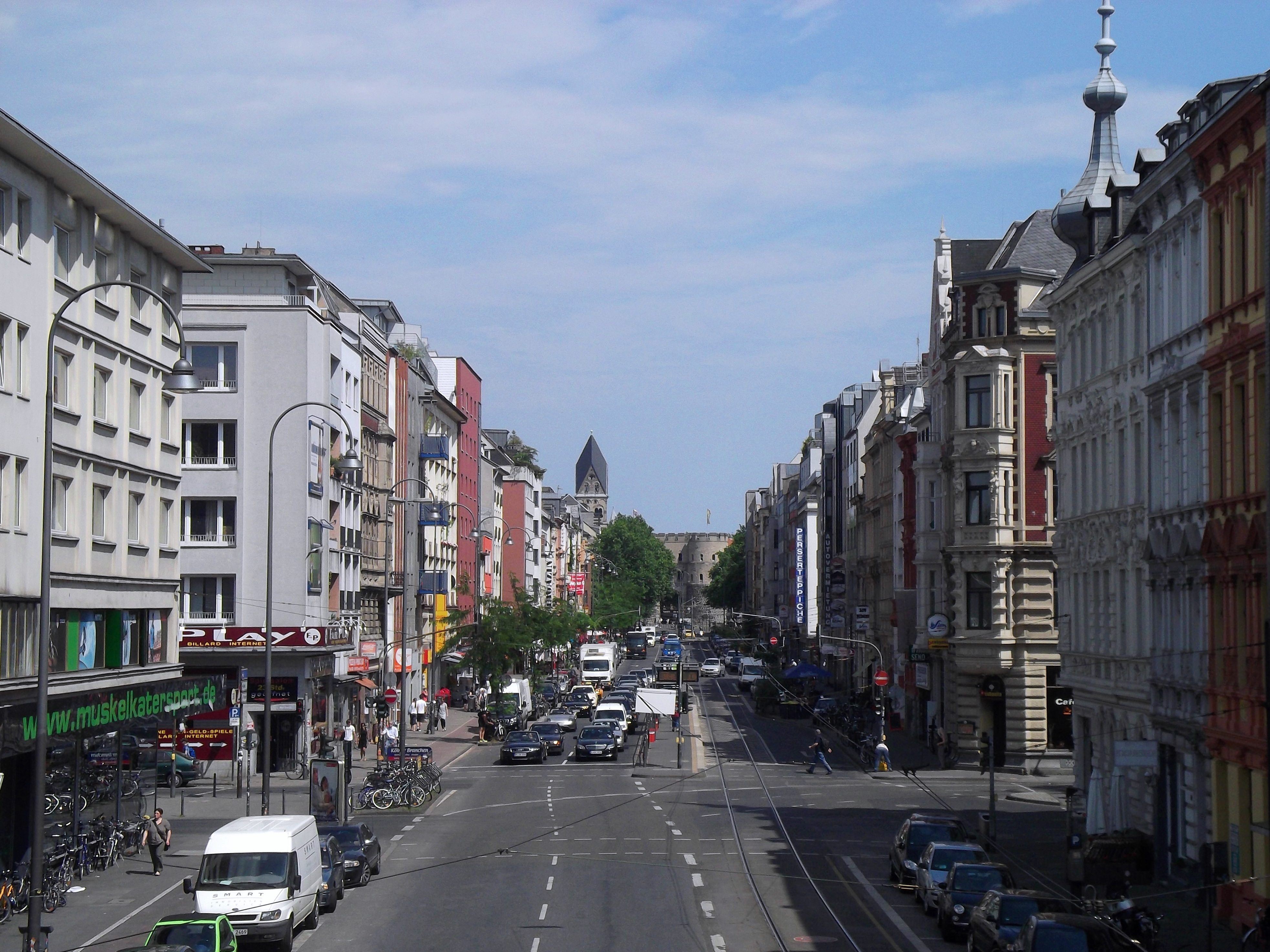 Cologne (Köln); Germany: Köln-Neustadt-Nord: Aachener Straße